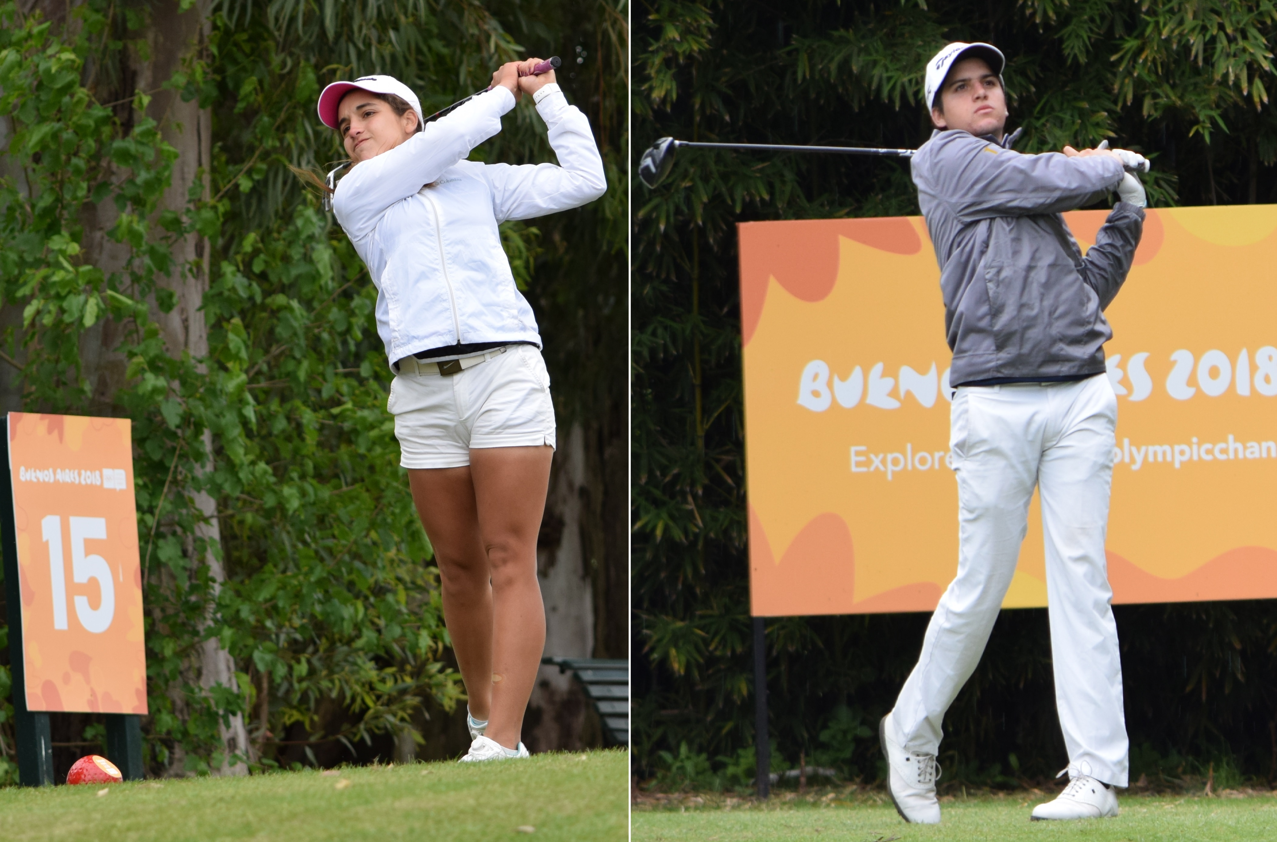 A la izquierda Ela Anacona. A la derecha Mateo Fernández de Oliveira. Equipo mixto de golf de Argentina. YOG2018